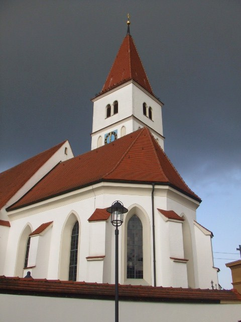 Evangelische St.-Lambertus-Kirche, Bernstadt (Alb), Alb-Donau-Kreis, Baden-Württemberg